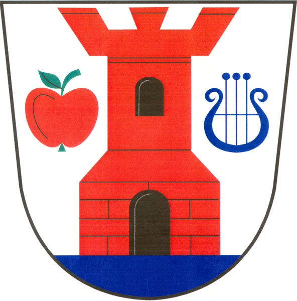 Znak obce Jabkenice